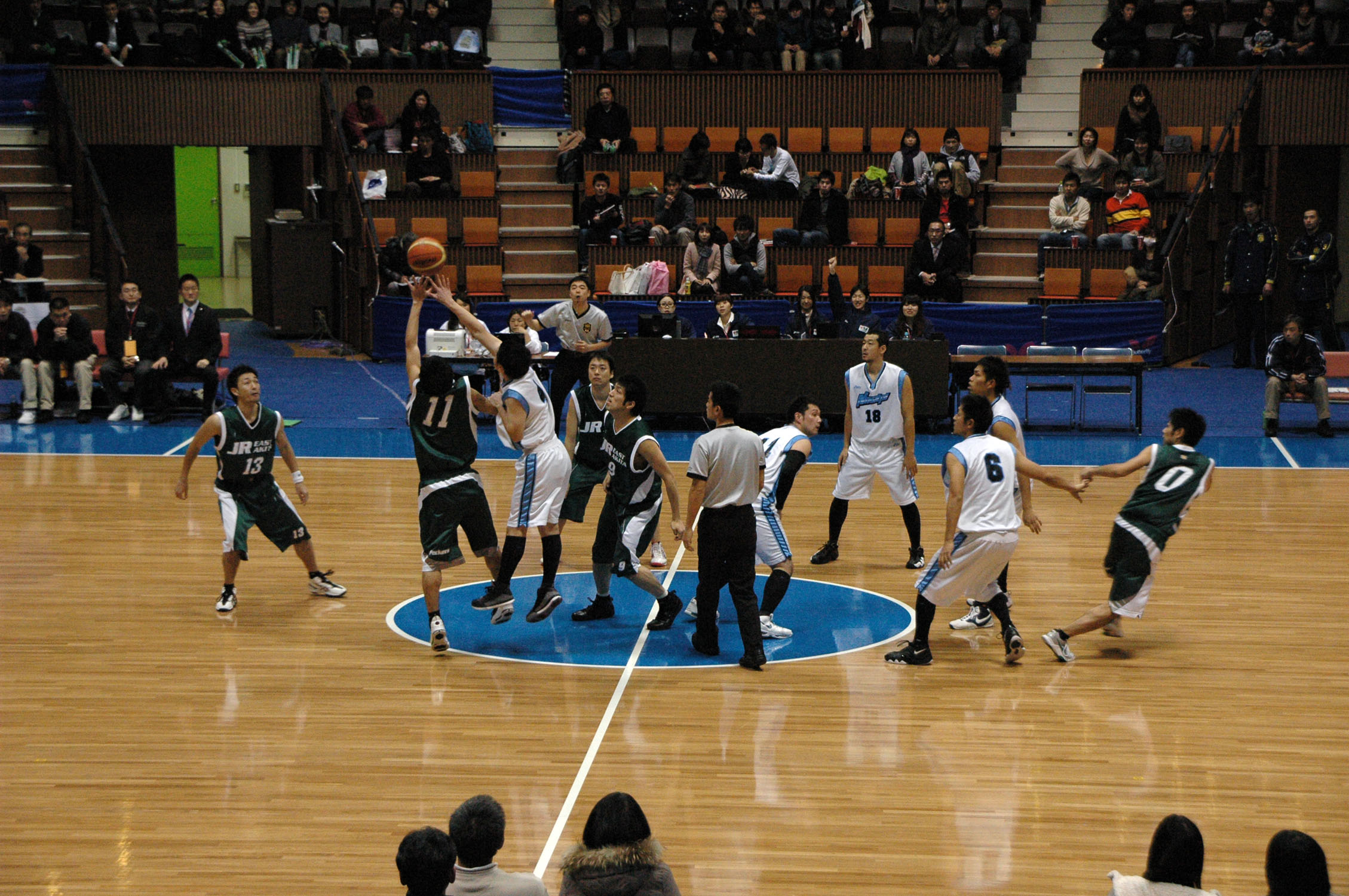 2011年全日本総合バスケットボール選手権大会1回戦、JR東日本秋田対新潟教員。代々木第二体育館で。